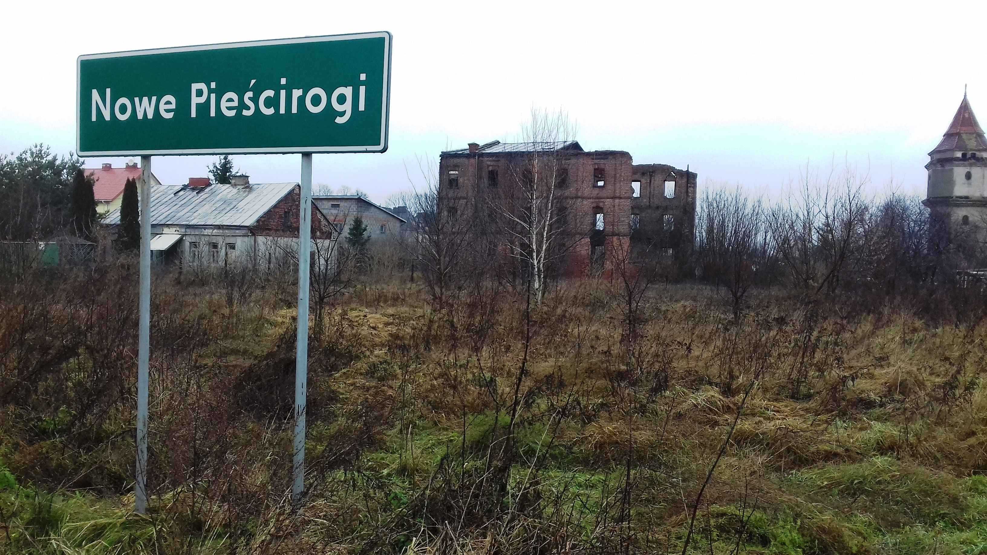 Pieścirogi Nowe (gm. Nasielsk, pow. Nowy Dwór Mazowiecki) - stary młyn